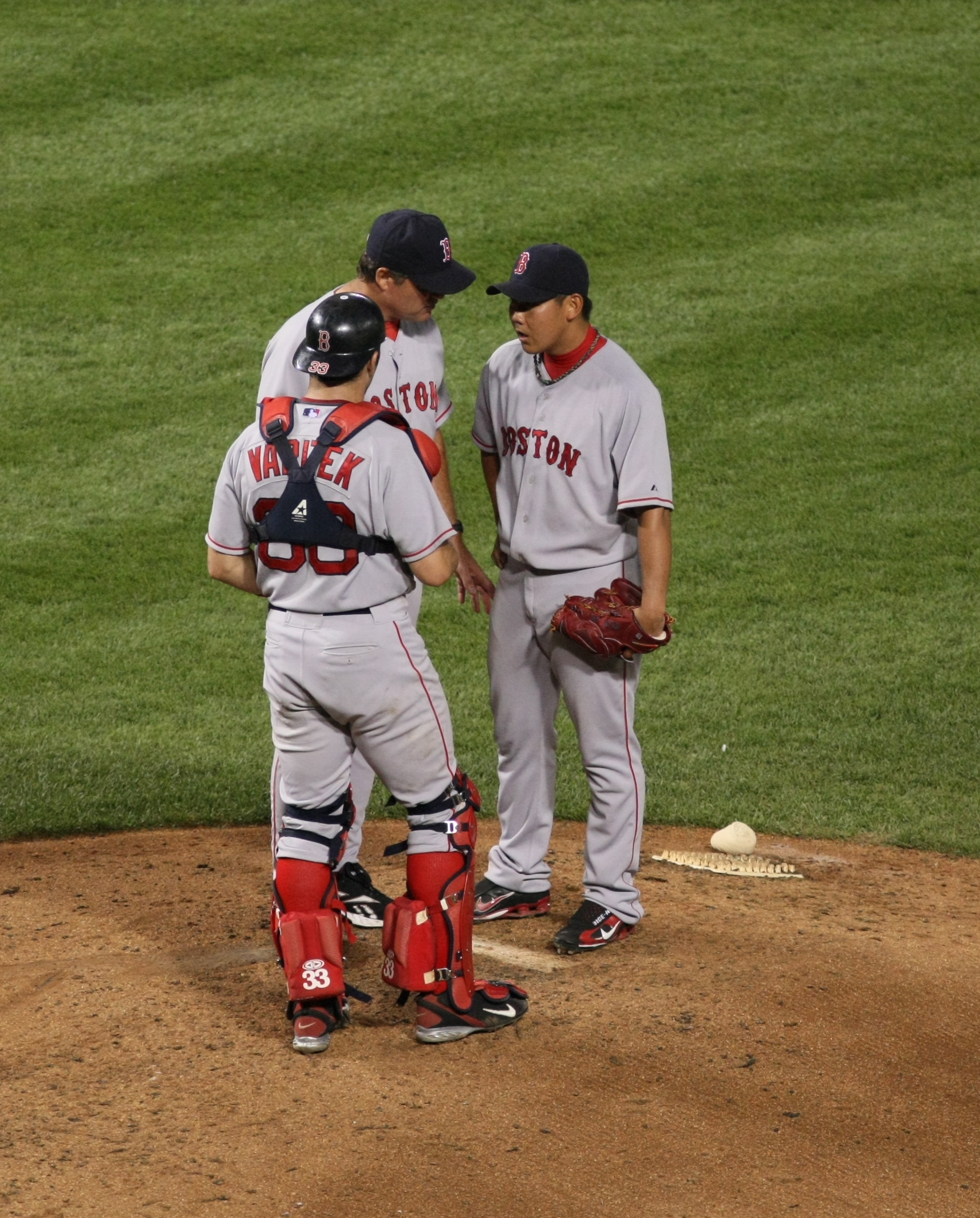 Daisuke Matsuzaka Reprint from Flickr